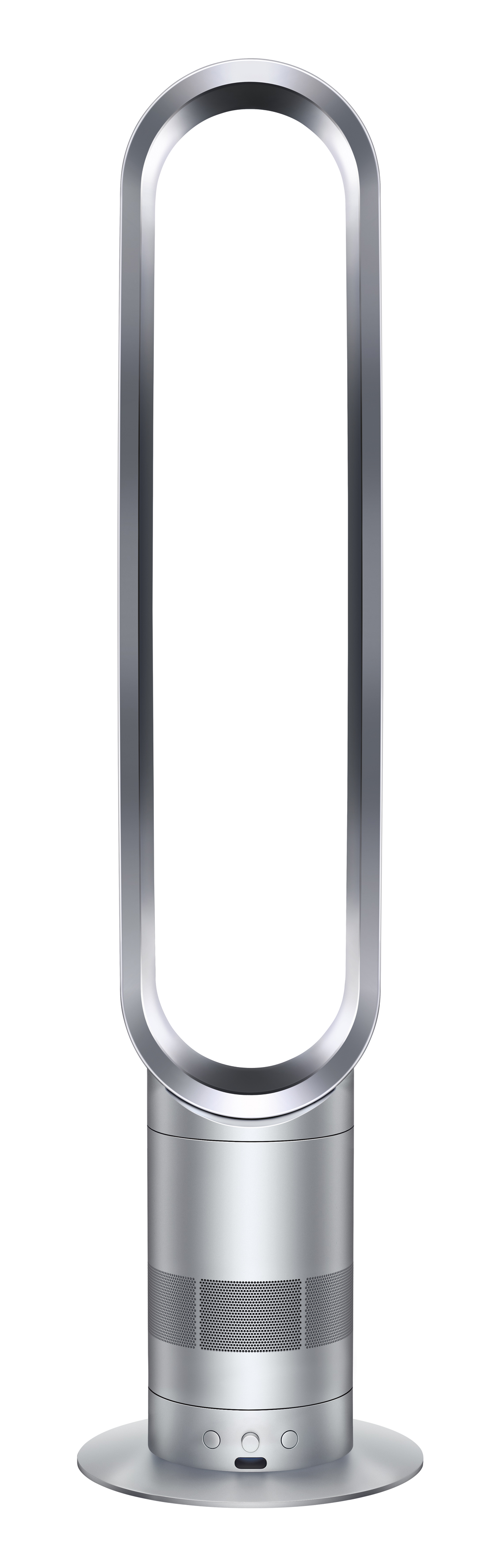 Вентилятор_Dyson_AM_02